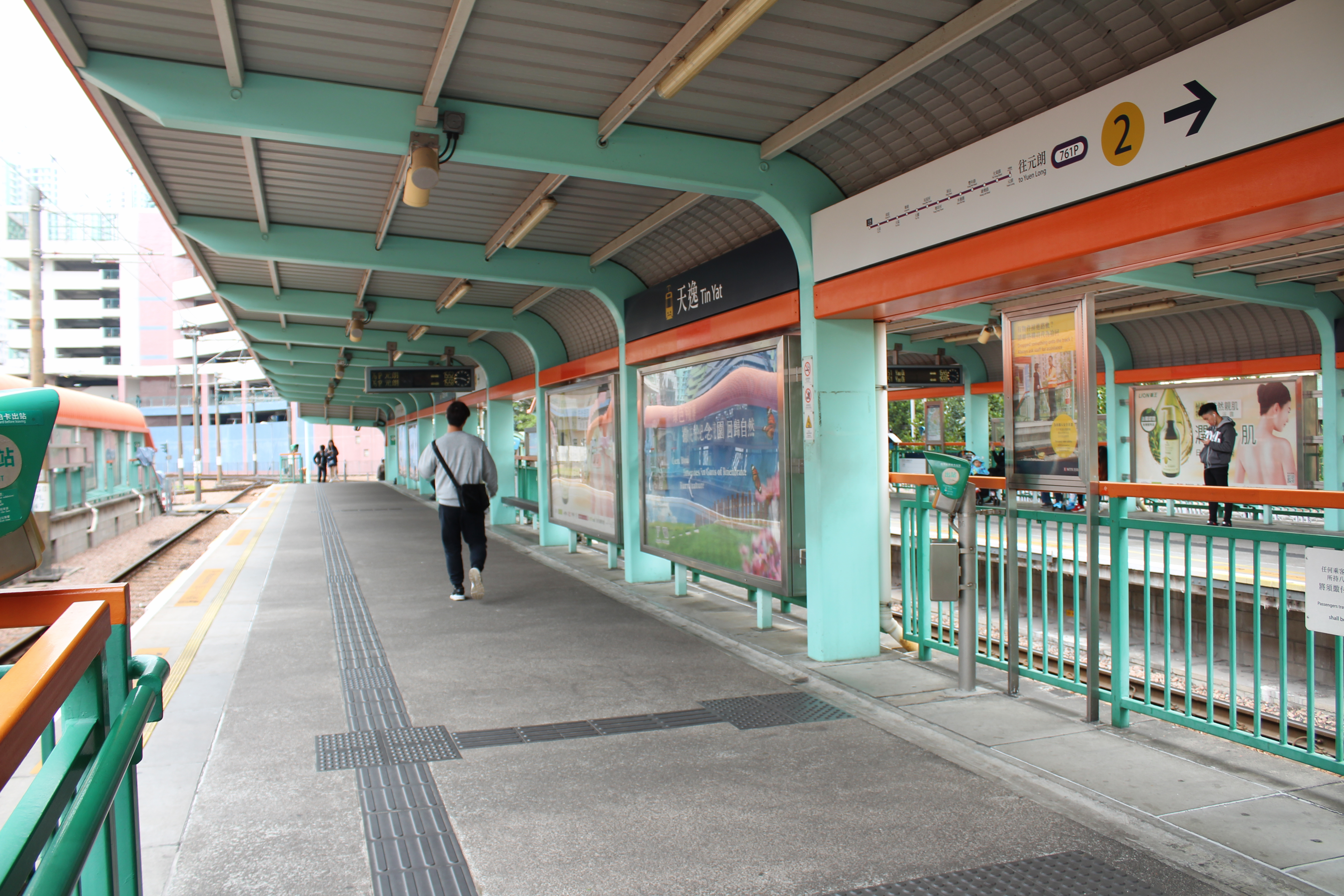 天逸站2號月台